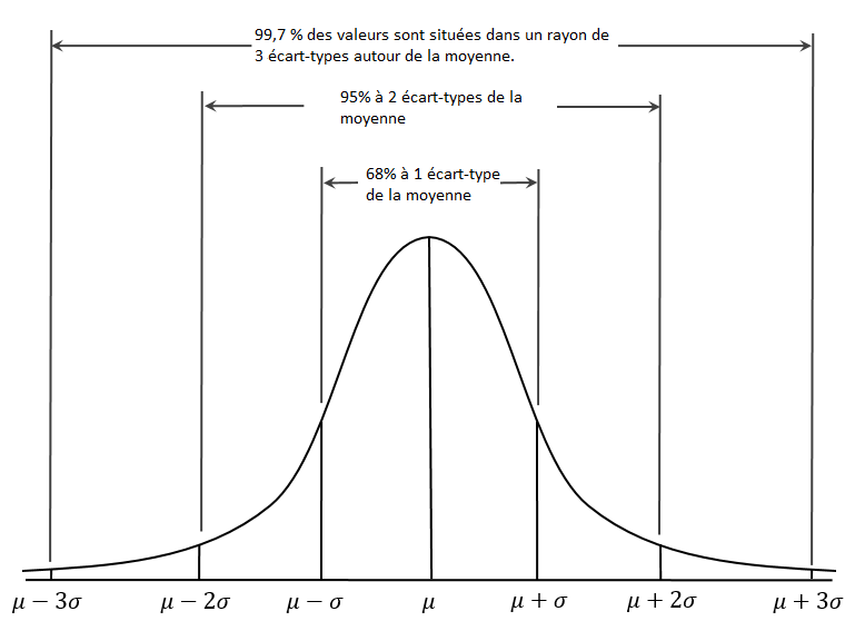 Une représentation graphique de la règle empirique des 3 sigmas (68-95-99.7) basée sur une distribution normale.